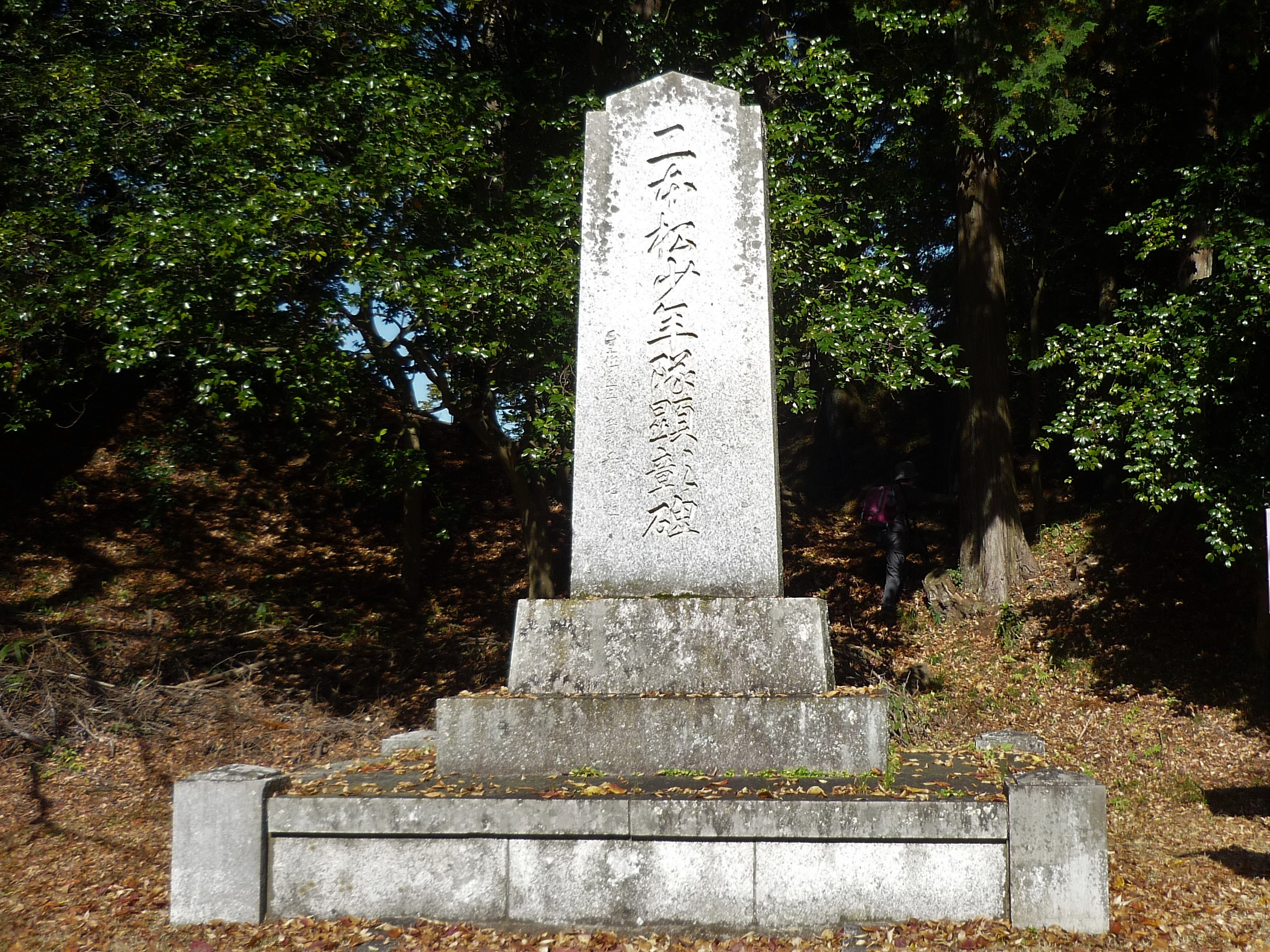 二本松少年隊顕彰碑 Panasonic Lumix DMC-FS3